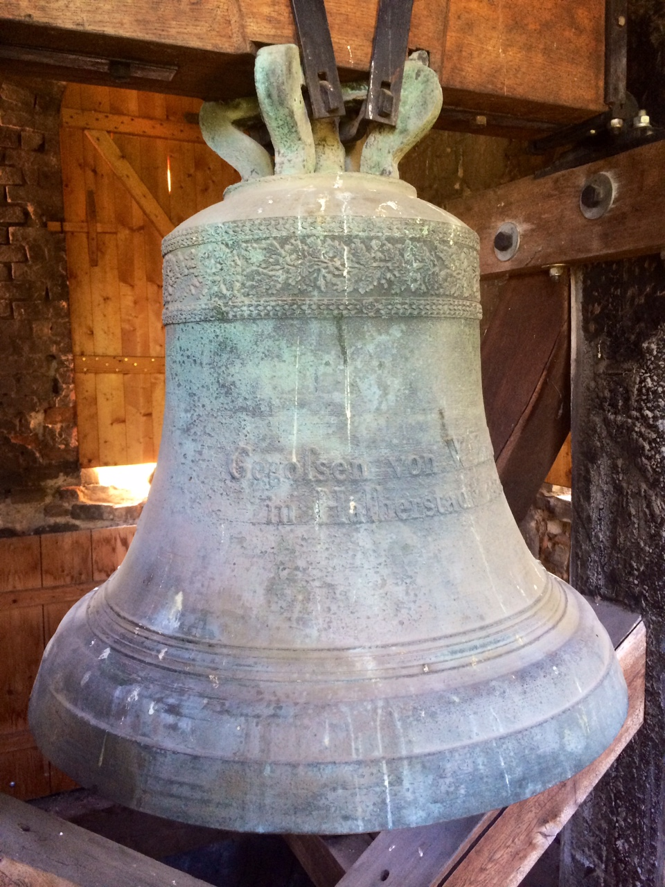 Glocke